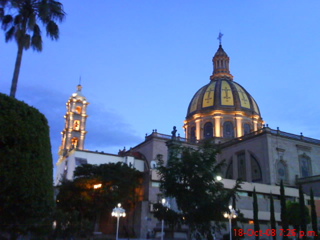 Parroquia del Señor de la Piedad